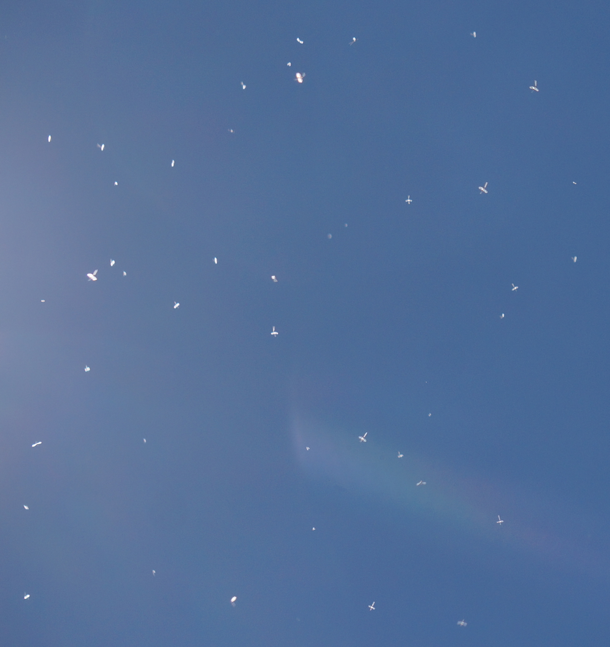 Mayfly Swarm No. 3